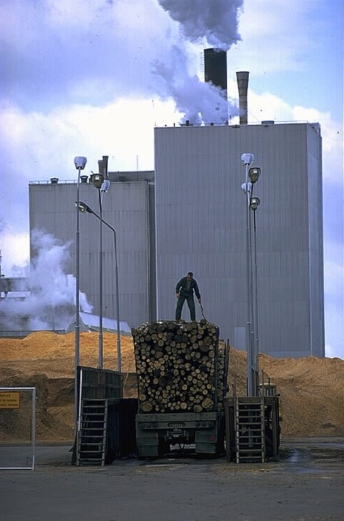 Cellulosafabrik. Bilden troligen från omkring 1970.